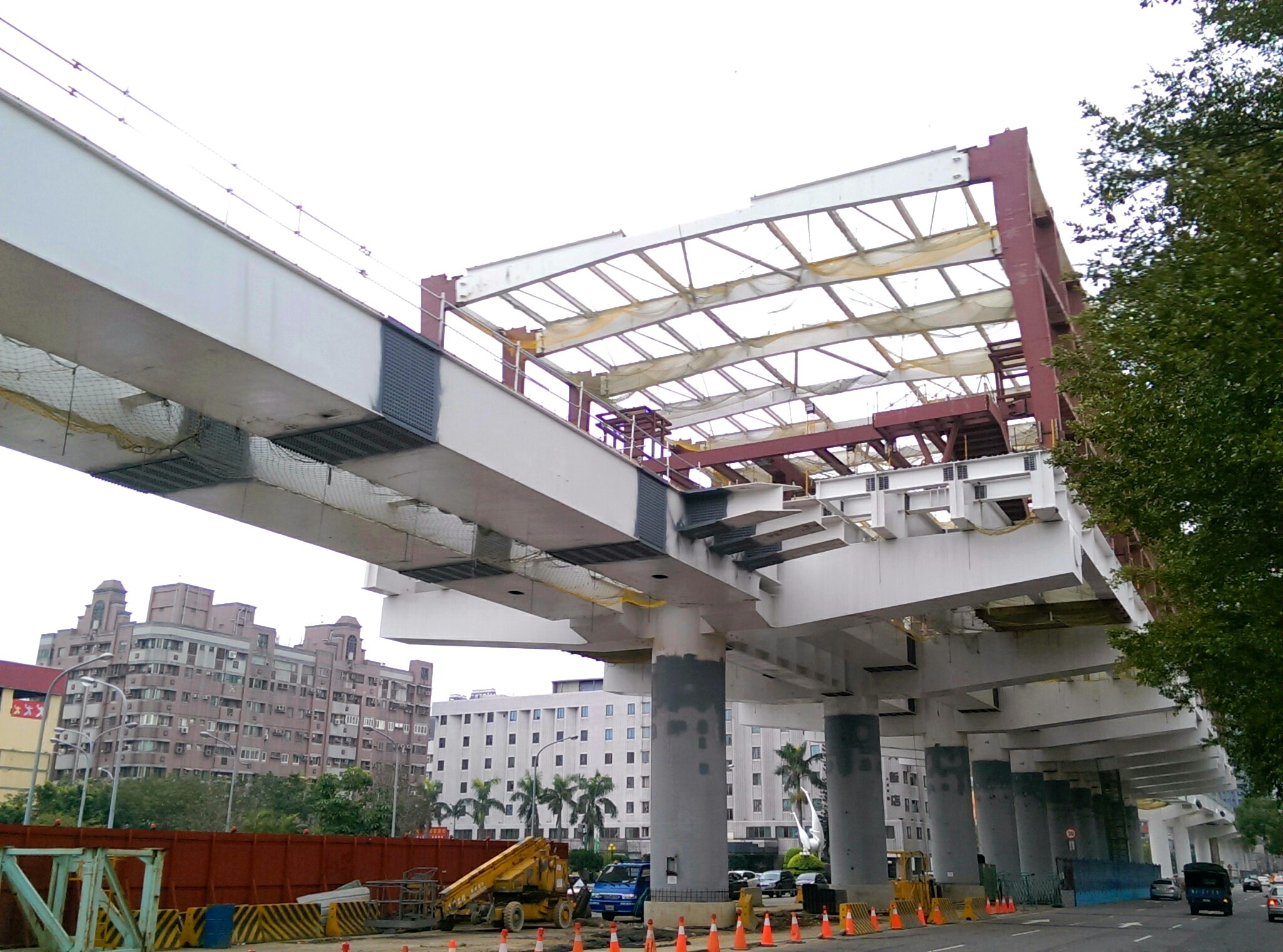 臺中捷運G9站2016年1月工程